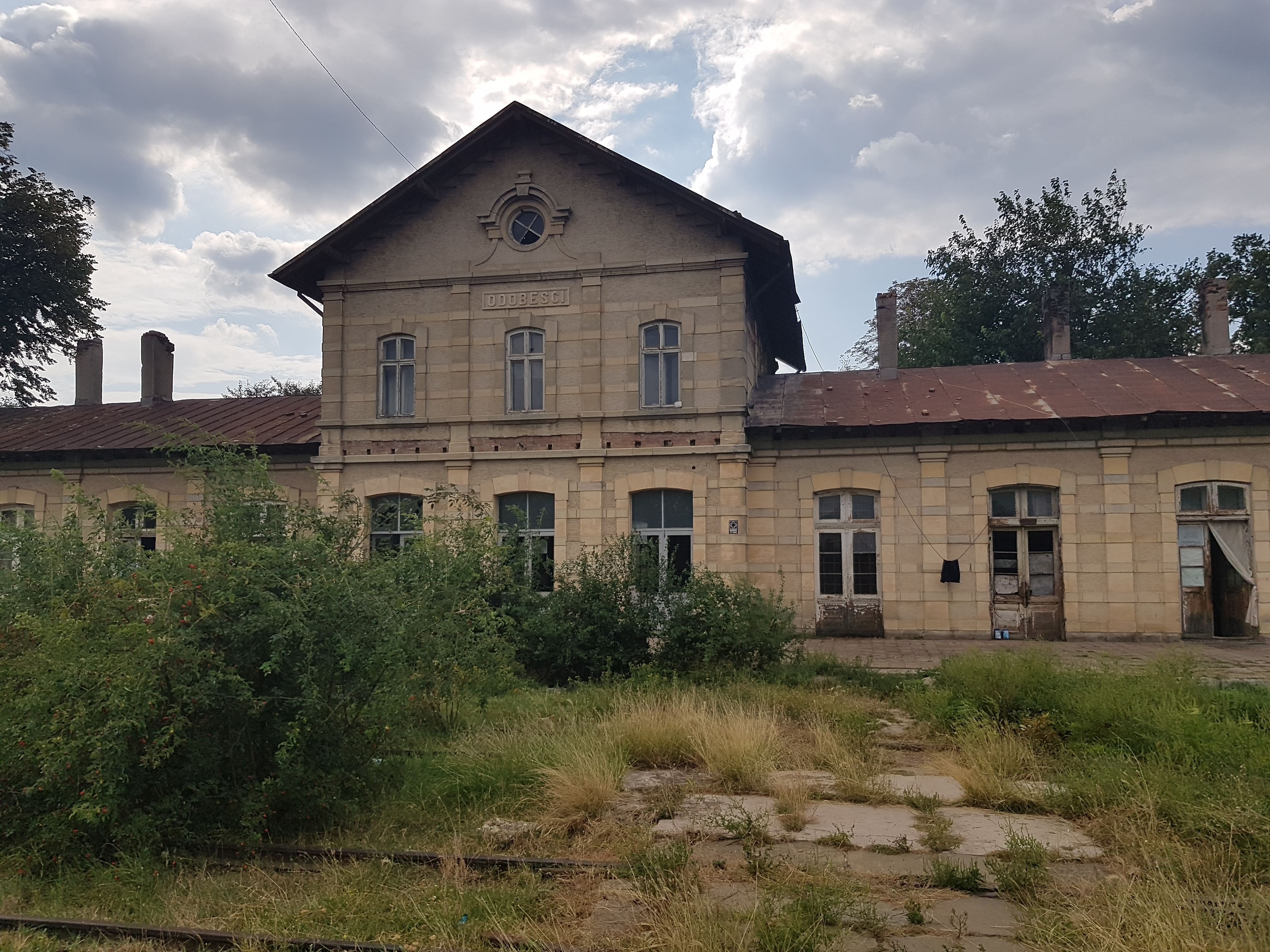 Gara Odobești